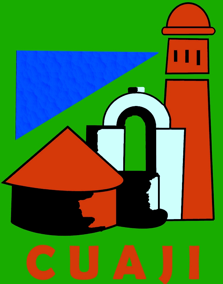 logo del municipio